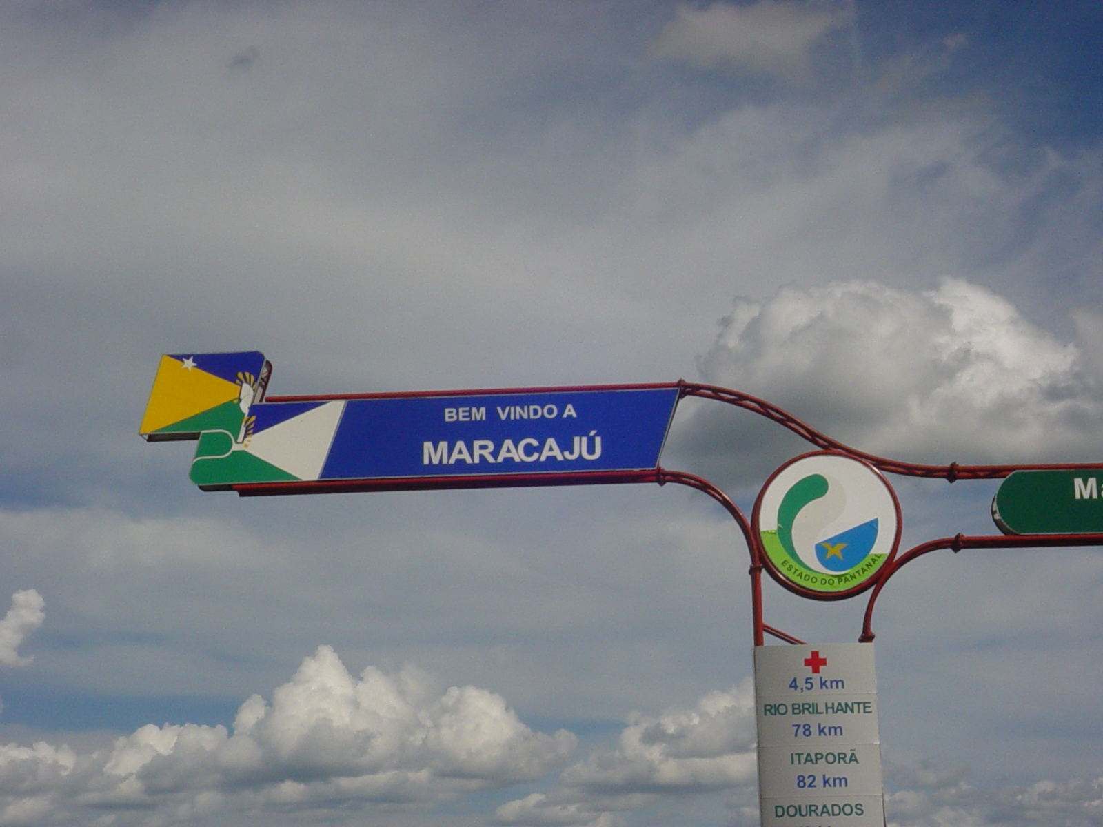 Binnenkomst Maracajú.